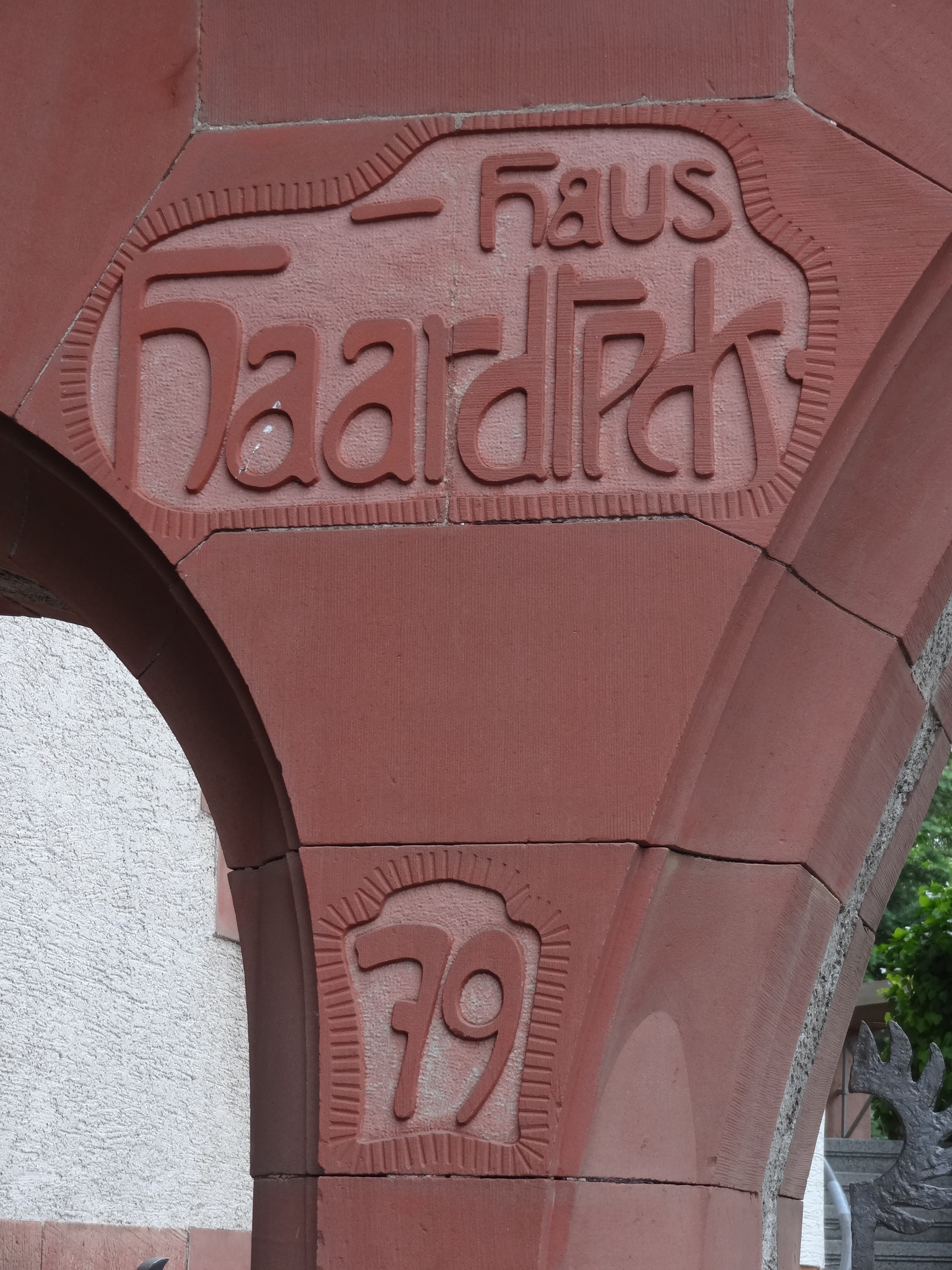 Haus Haardteck, Herdweg 79 in Darmstadt